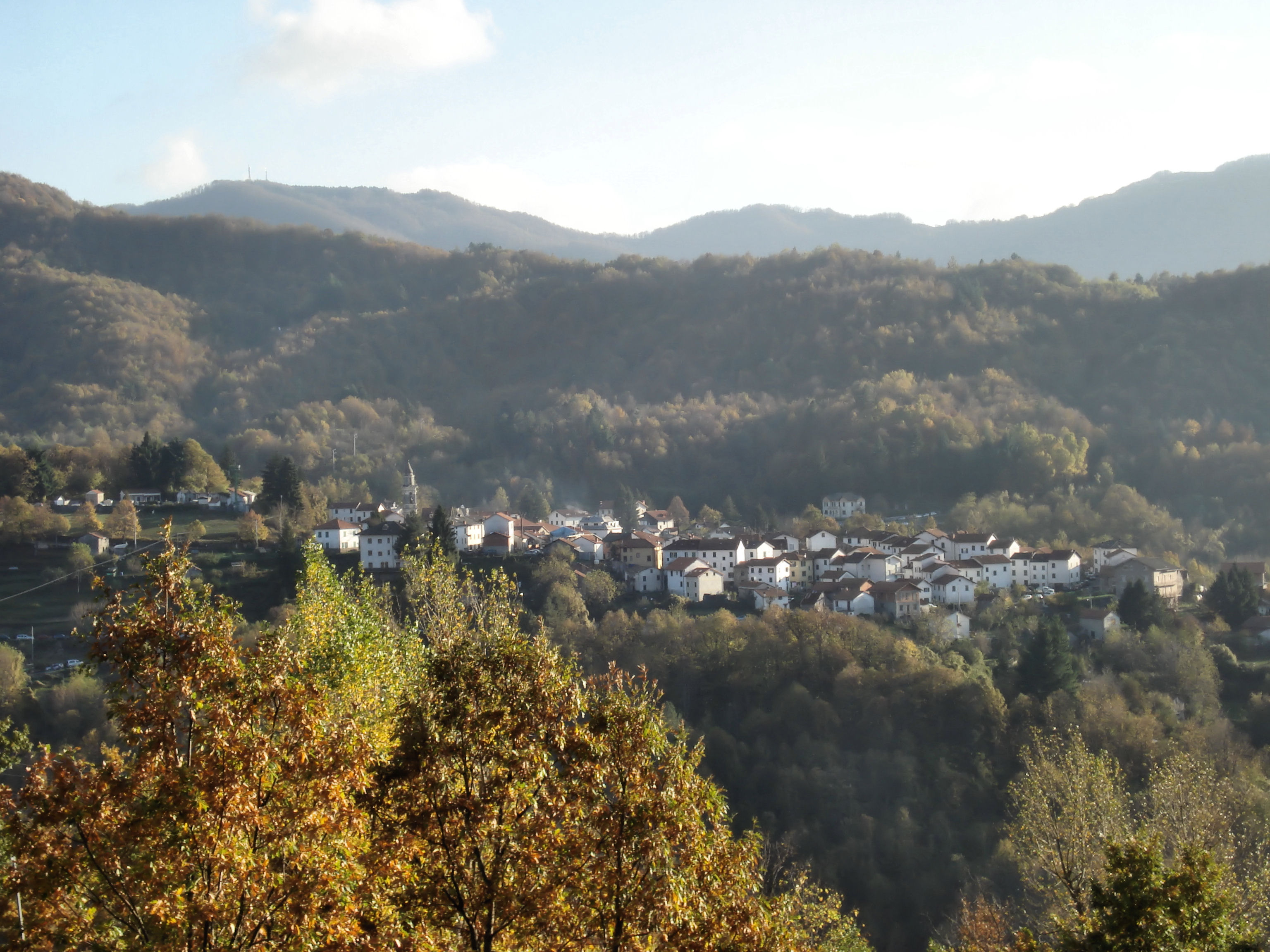 Cosmin latan,26/10/2008,Fontanigorda.